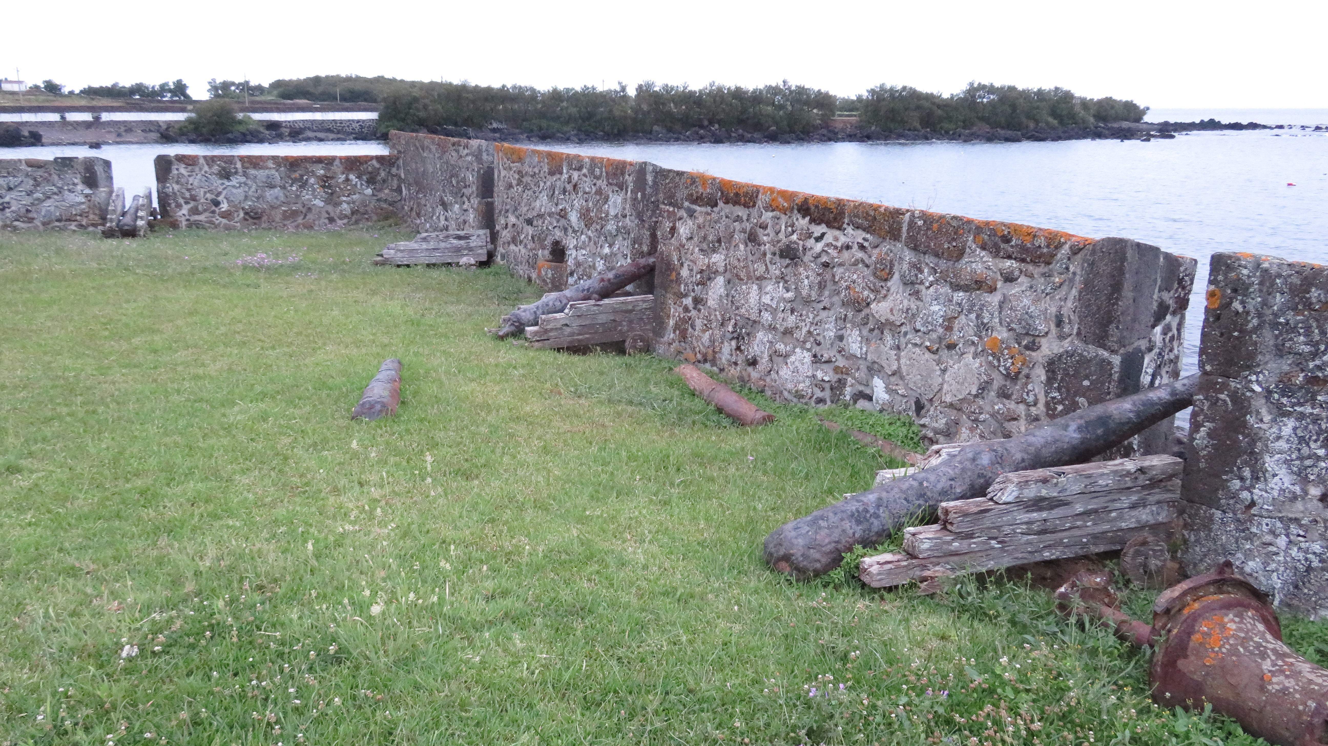 Forte da Barra, Santa Cruz da Graciosa, Ilha Graciosa, Portugal